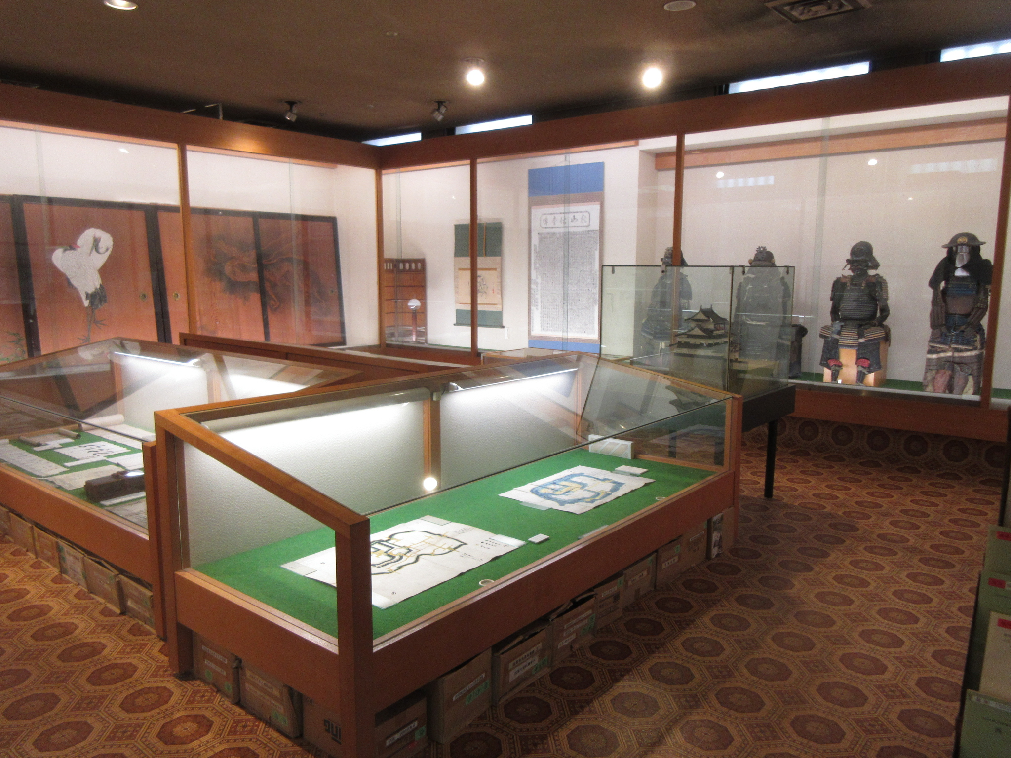 西尾市資料館（西尾市錦城町）